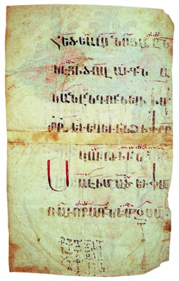 Маштоц. Текст с хазами. X в. (Матен. 1001. Фрагмент 294)